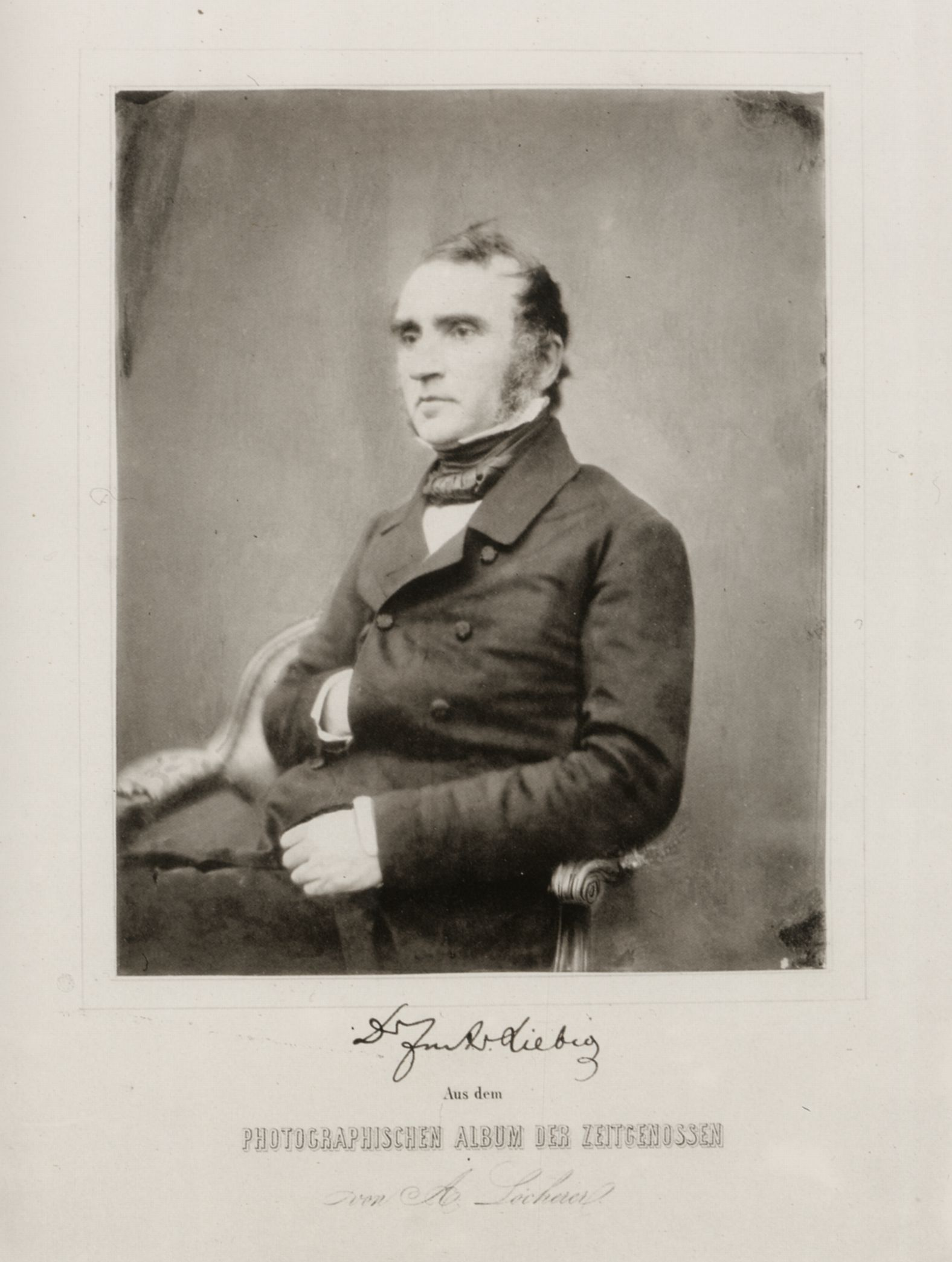 Justus von Liebig